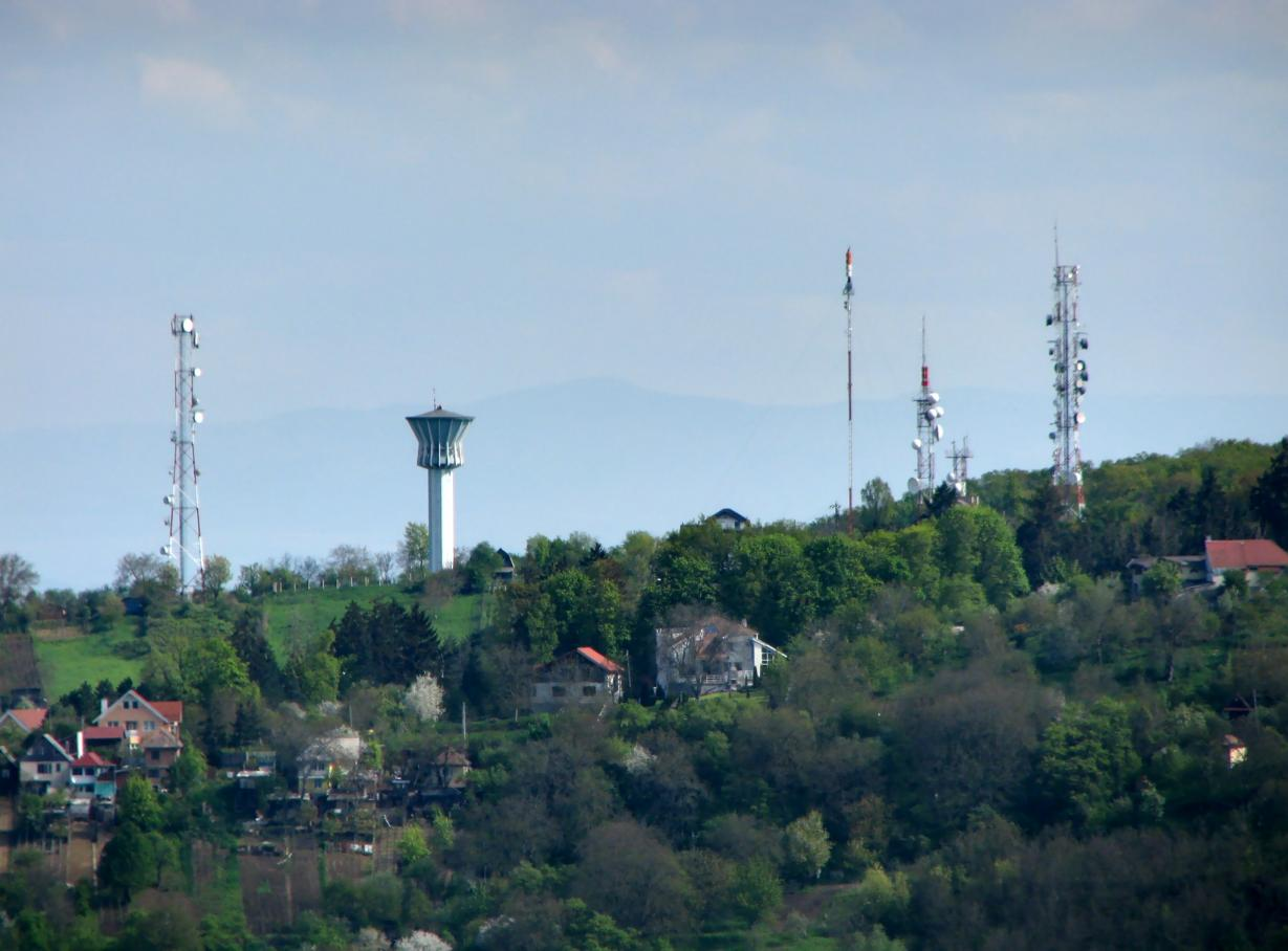 Platoul Cornesti